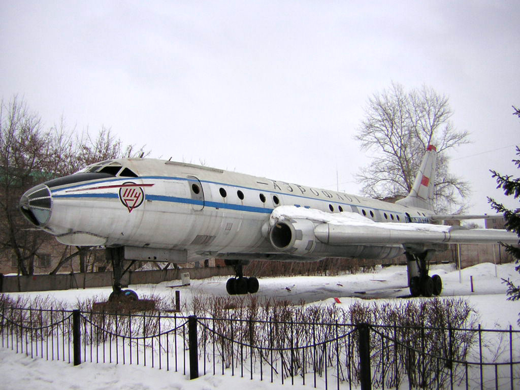 ТУ-104, бортовой номер 42376 в марте 2005 года